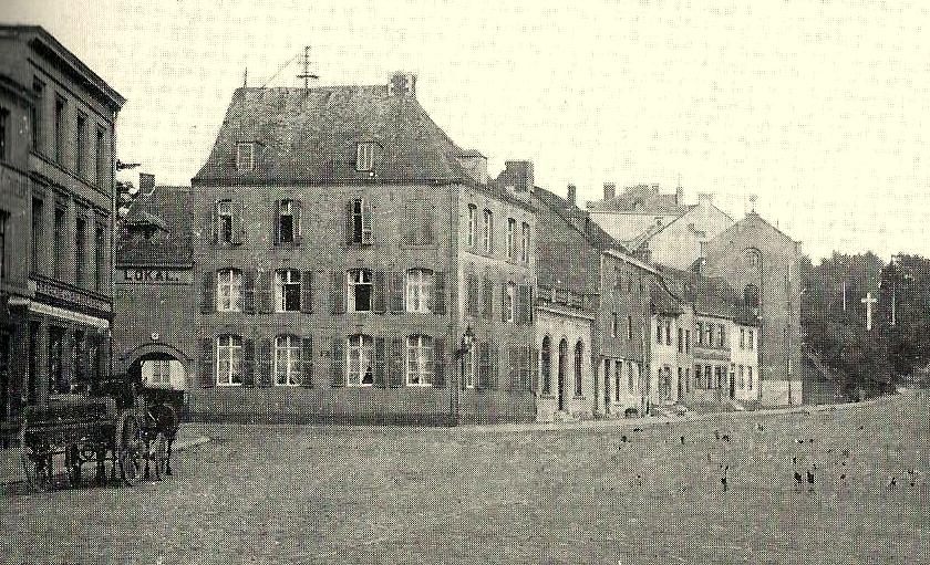 Brauerei und Gaststätte August Tonnar in Eupen